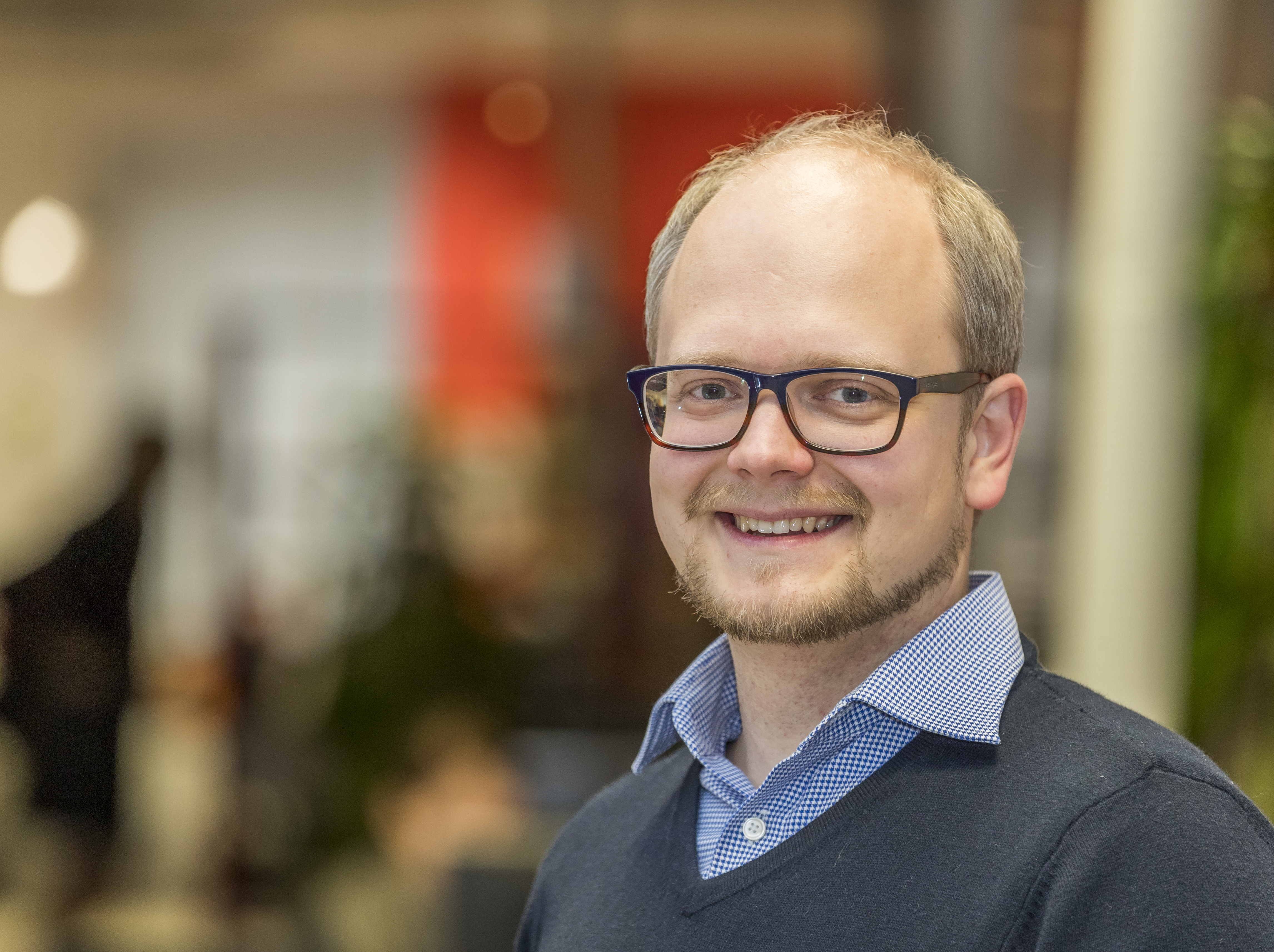 Alo Raun